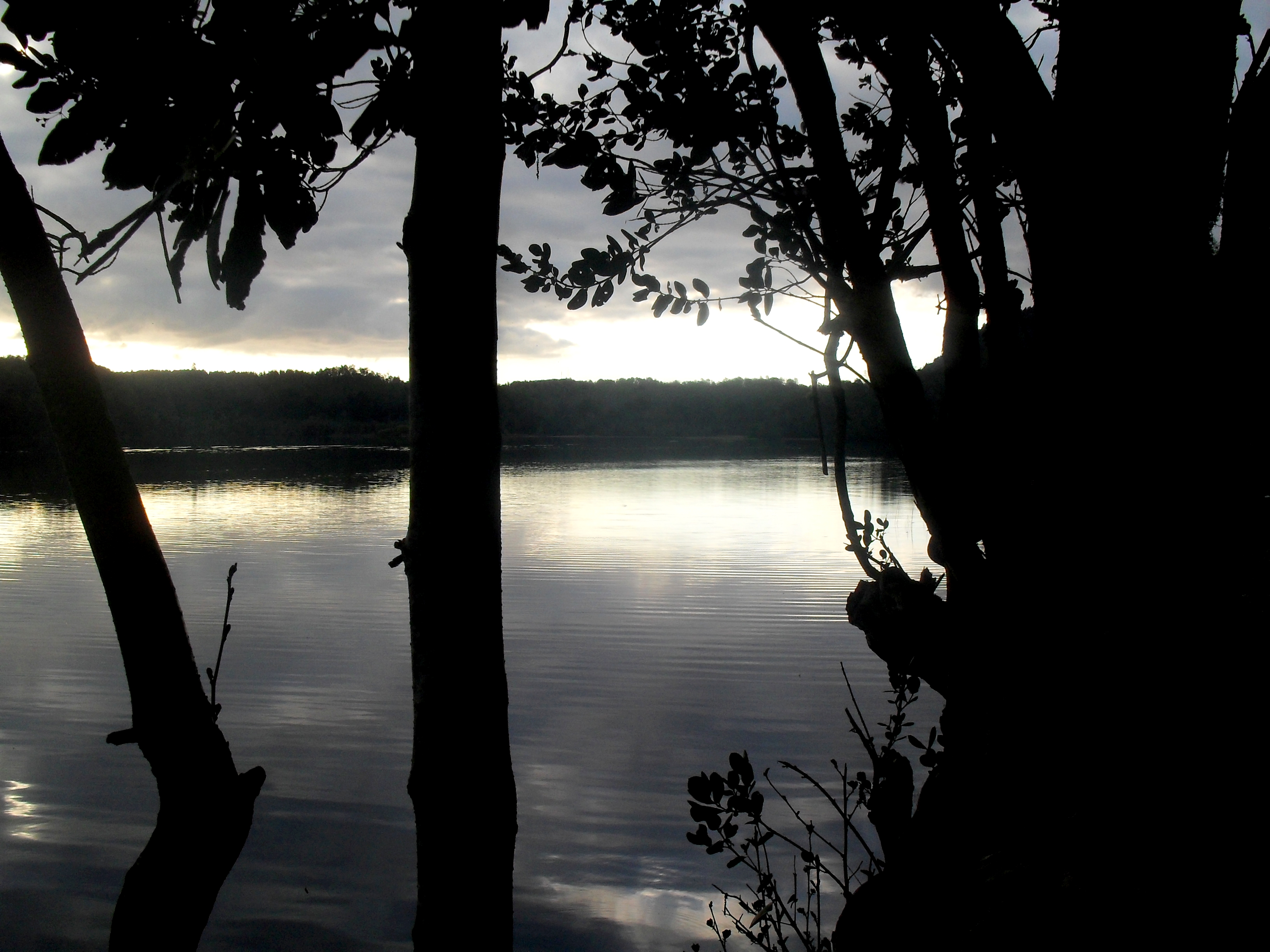 Fotografía capturada en la ribera del lago Colico en la IX Región de la Araucania, Chile.